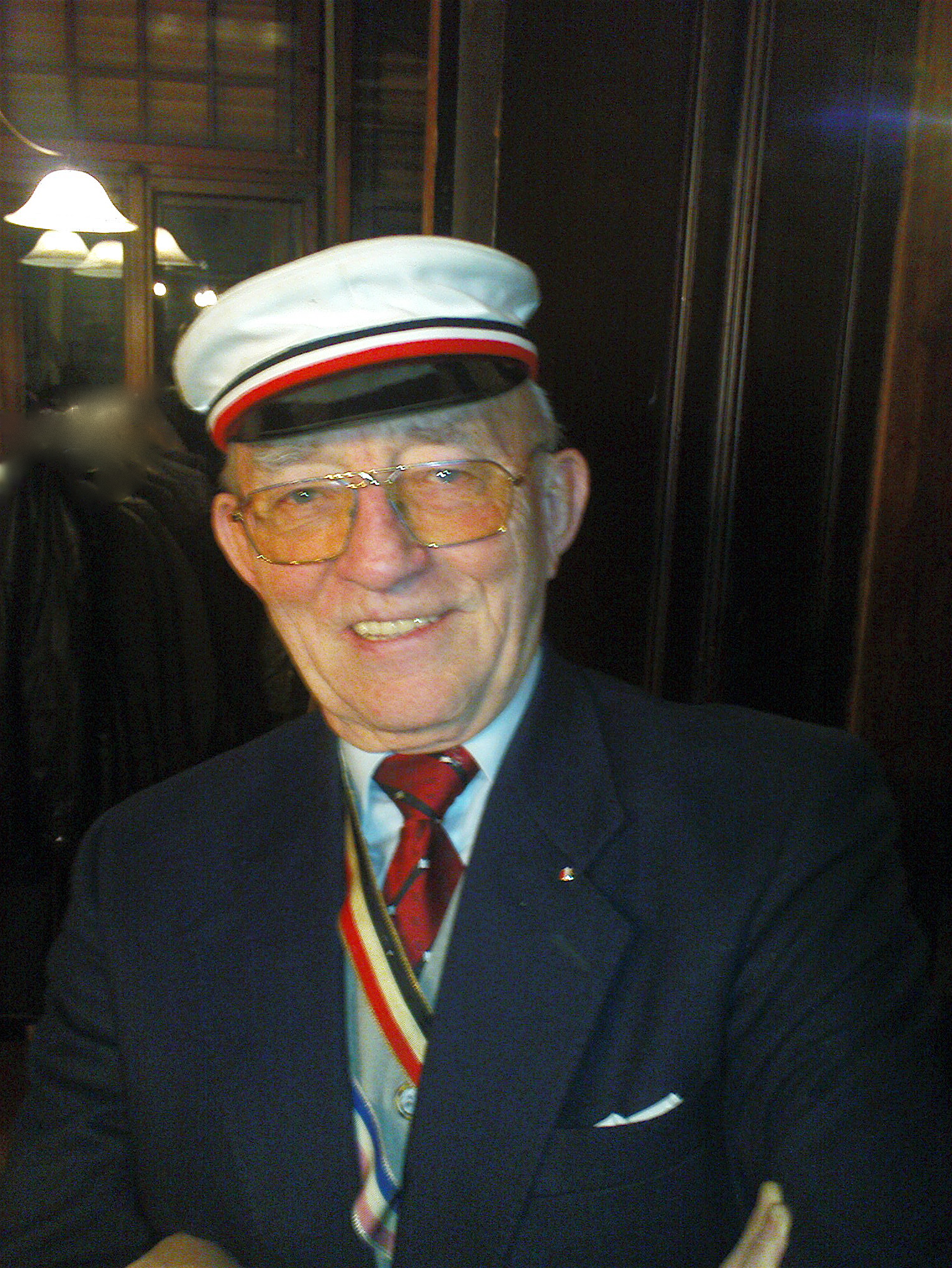 Prof. Dr. Hermann Rink, 1. Vorsitzender des Vorstandes des Verbandes Alter Corpsstudenten e.V. auf dem Hause des Corps Bavaria Würzburg